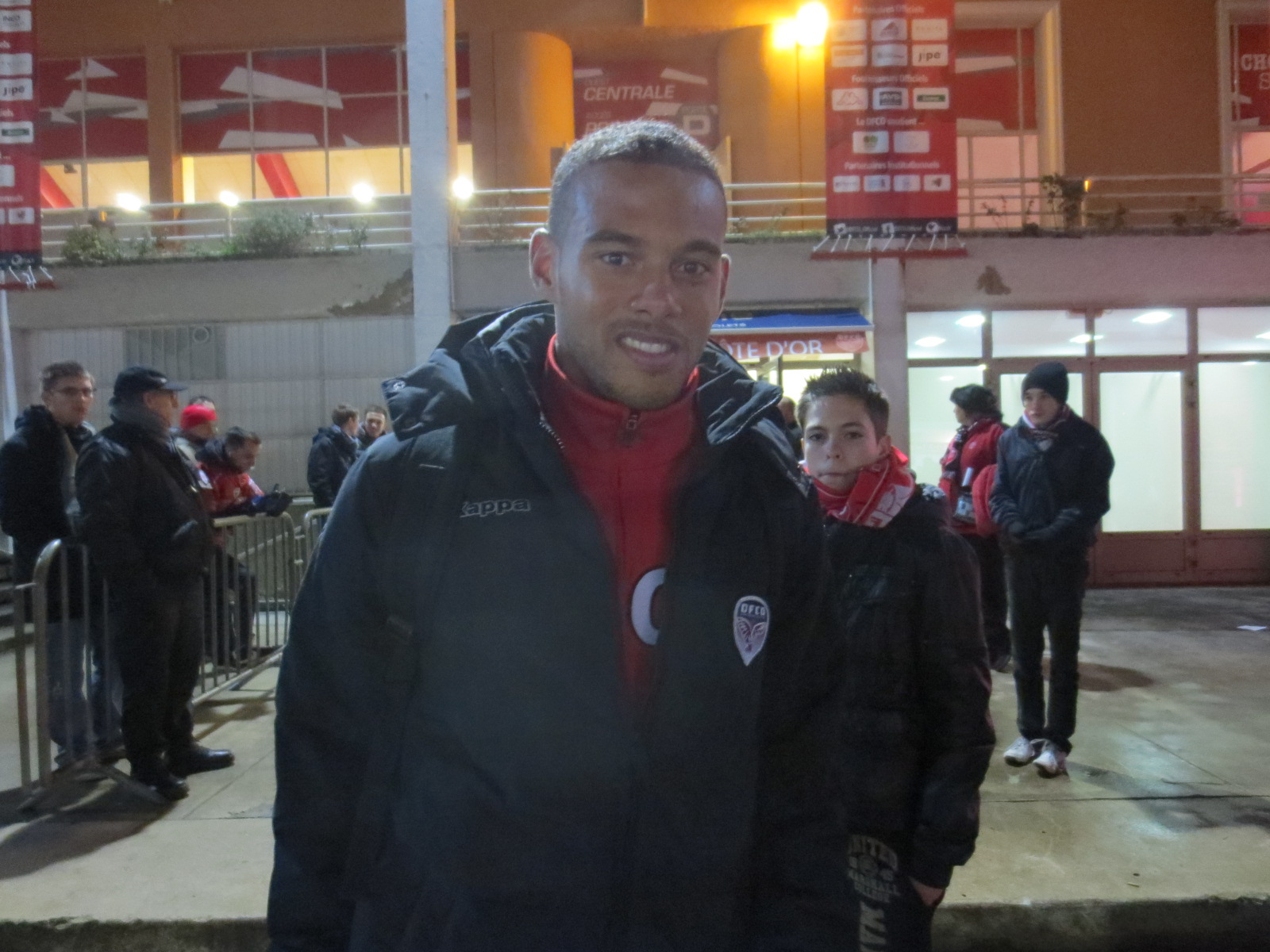 Rémi Mulumba, en 2013 au DFCO